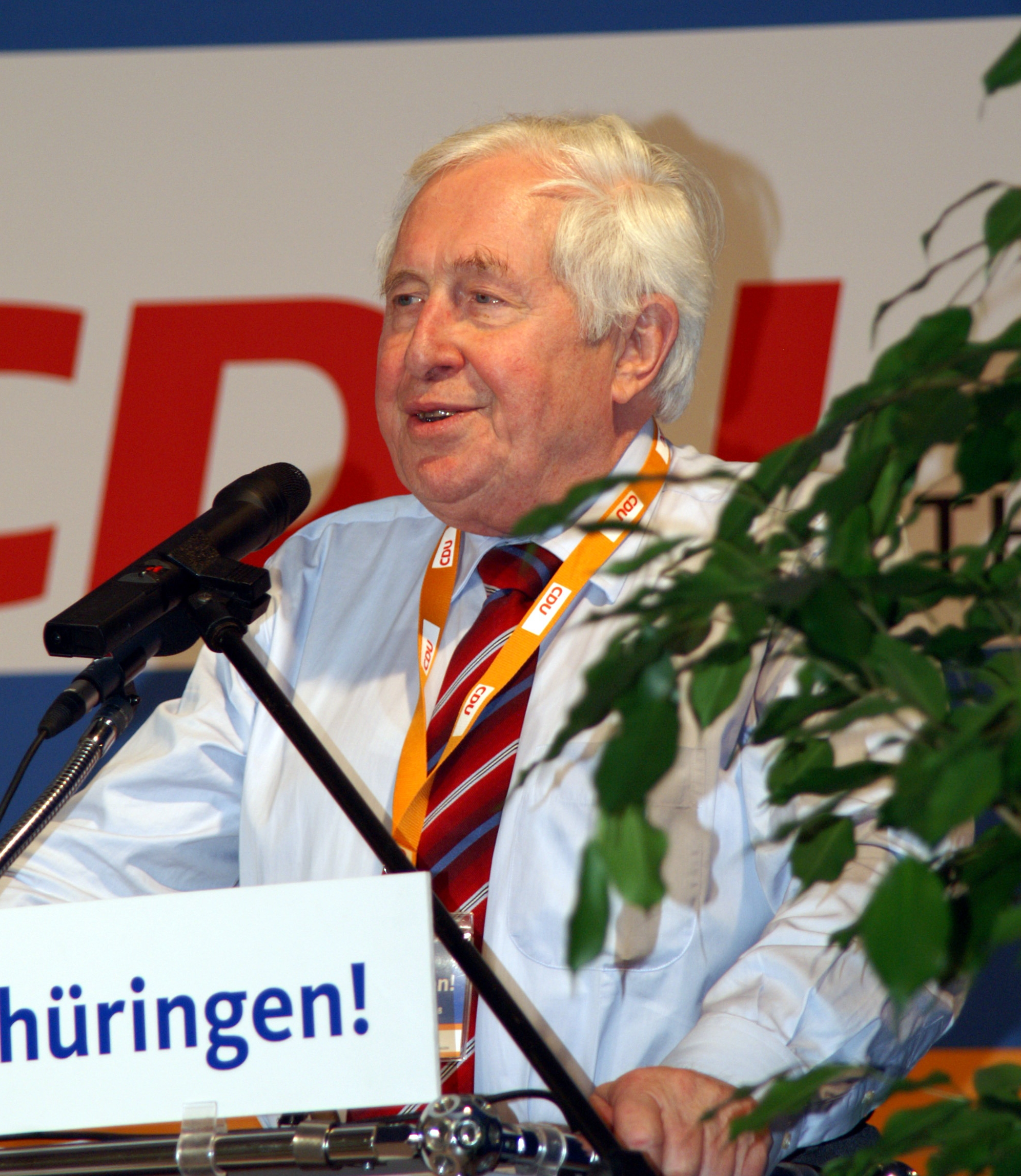 Dr. Bernhard Vogel, Ministerpräsident a.D.